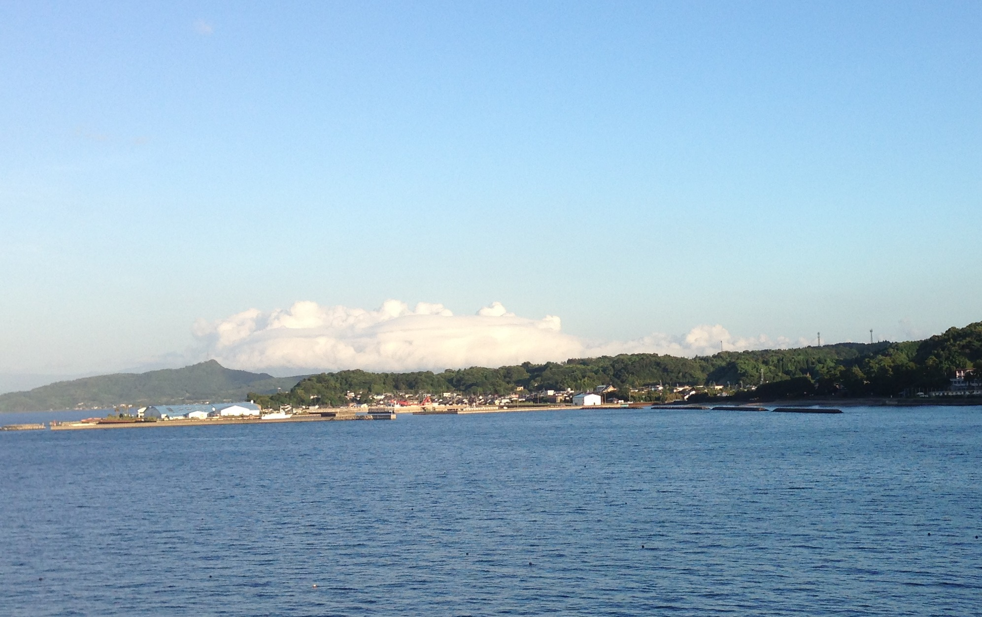 道の駅指宿から指宿市岩本付近を望む。